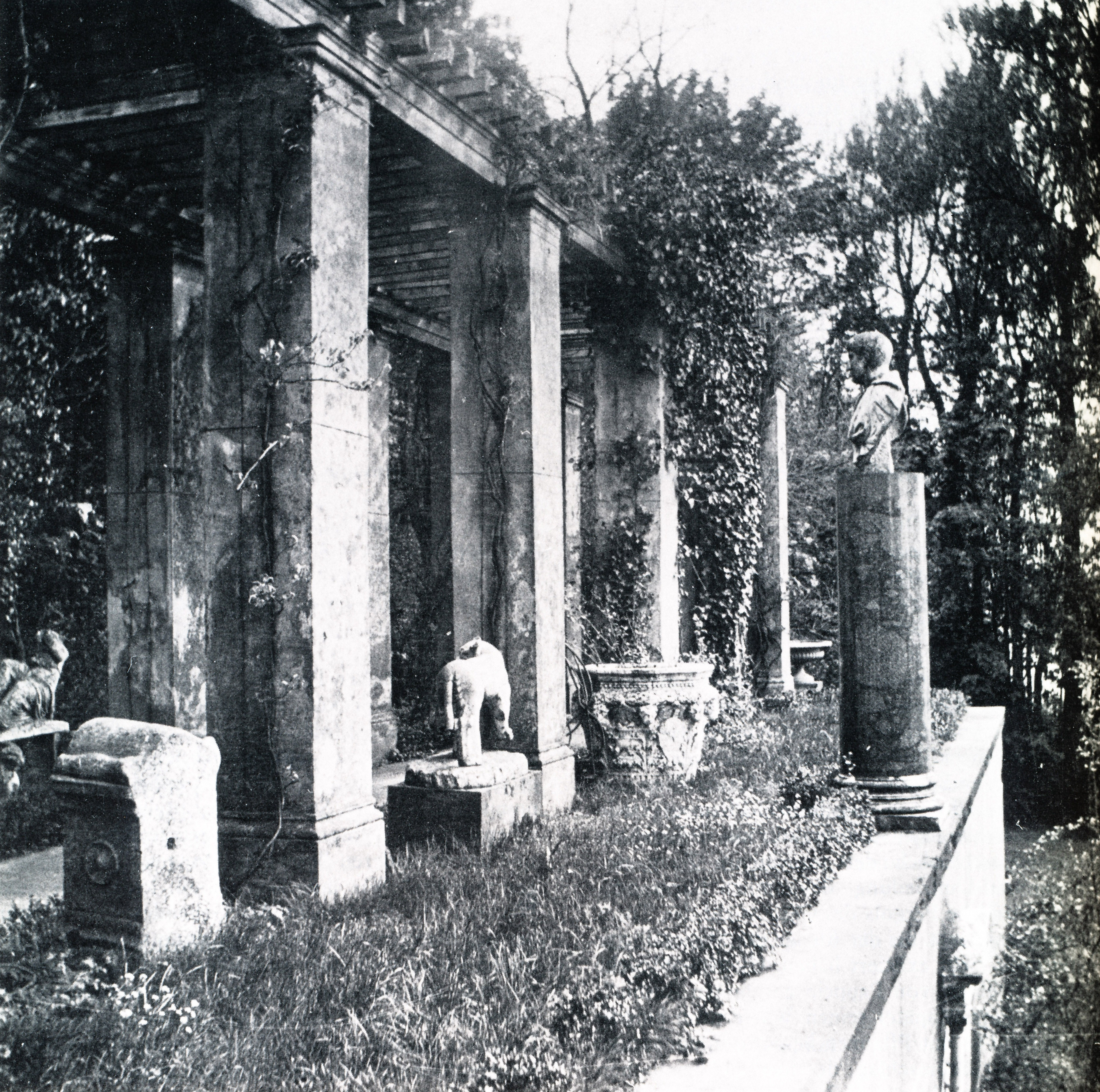 Die Nordpergola des Casinos Klein-Glienicke, Robert Scholz 1874/75